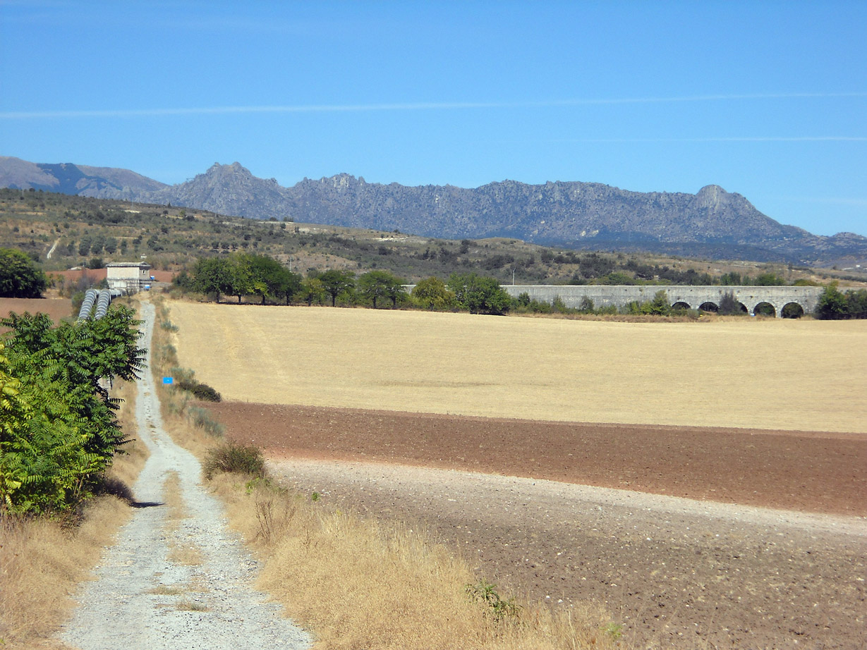 Final del canal de La Parra: Acueducto de la Aldehuela y almenara del Empalme. Al fondo la Sierra de La Cabrera.